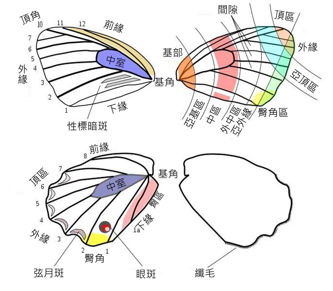 蝴蝶翅膀術語